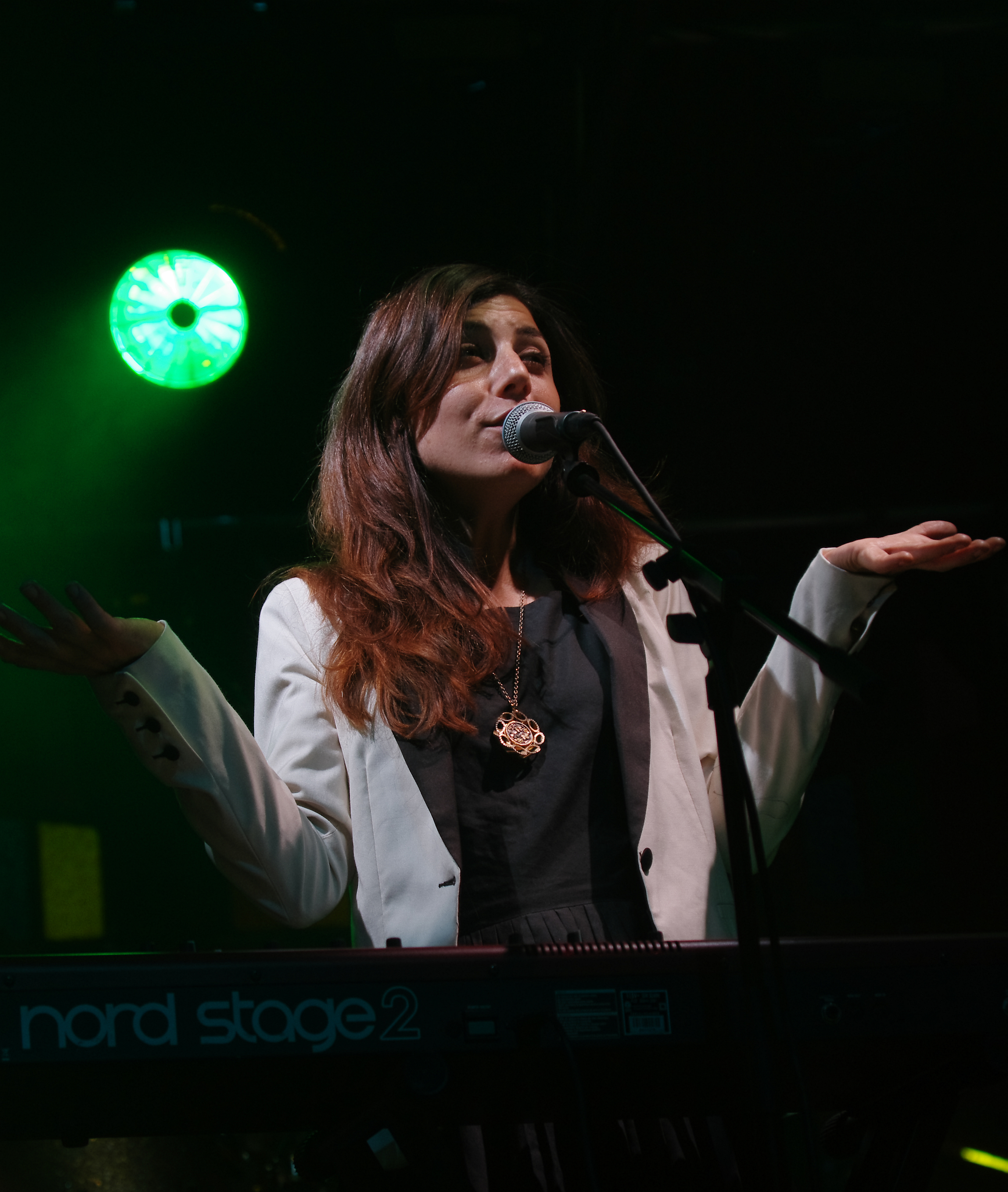 Julia Holter im Spiegelzelt auf dem 30. Haldern Pop Festival 2013